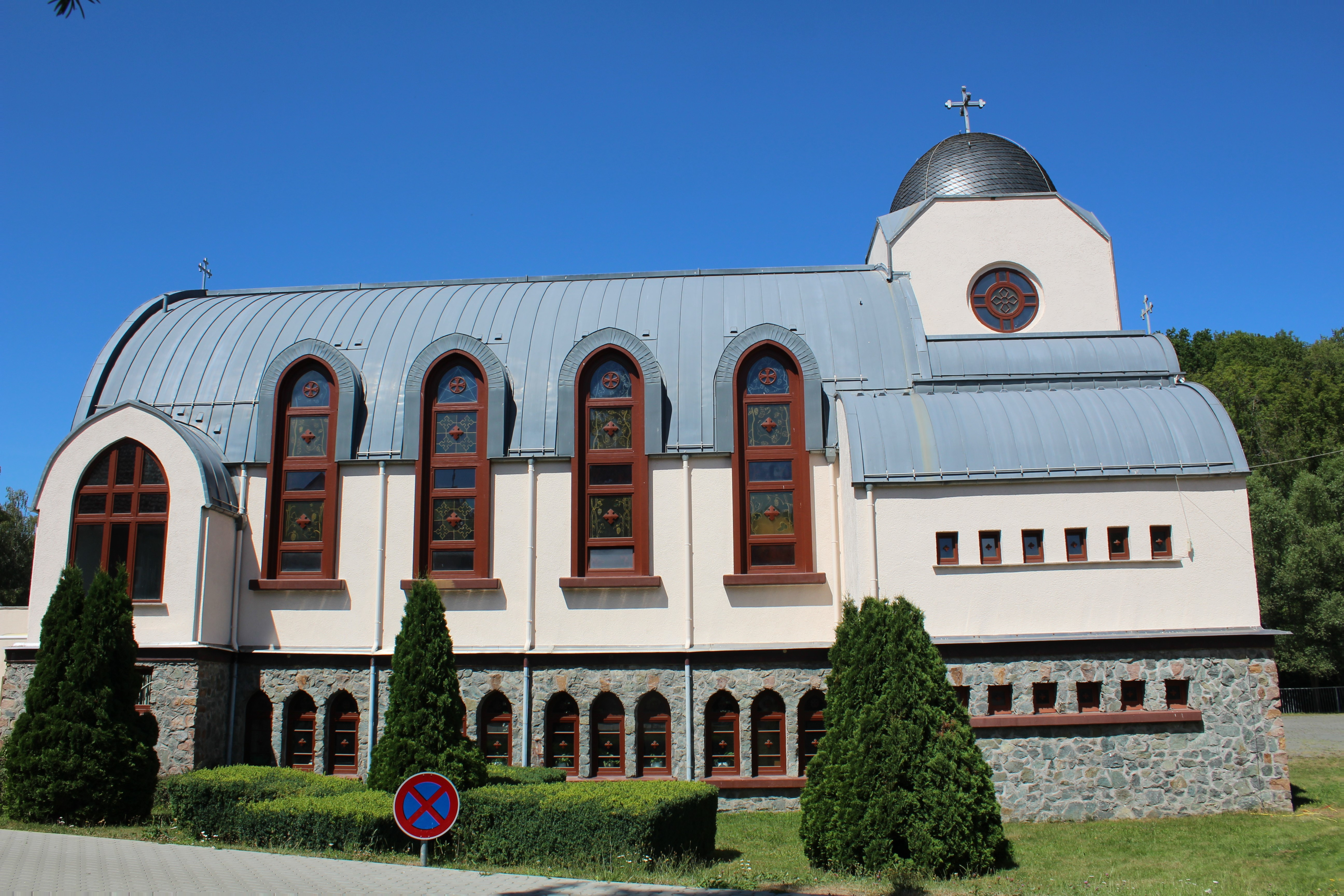 Koptisch-orthodoxes Kloster Ktröffelbach, Waldsolms, Lahn-Dill-Kreis, Hessen, Deutschland